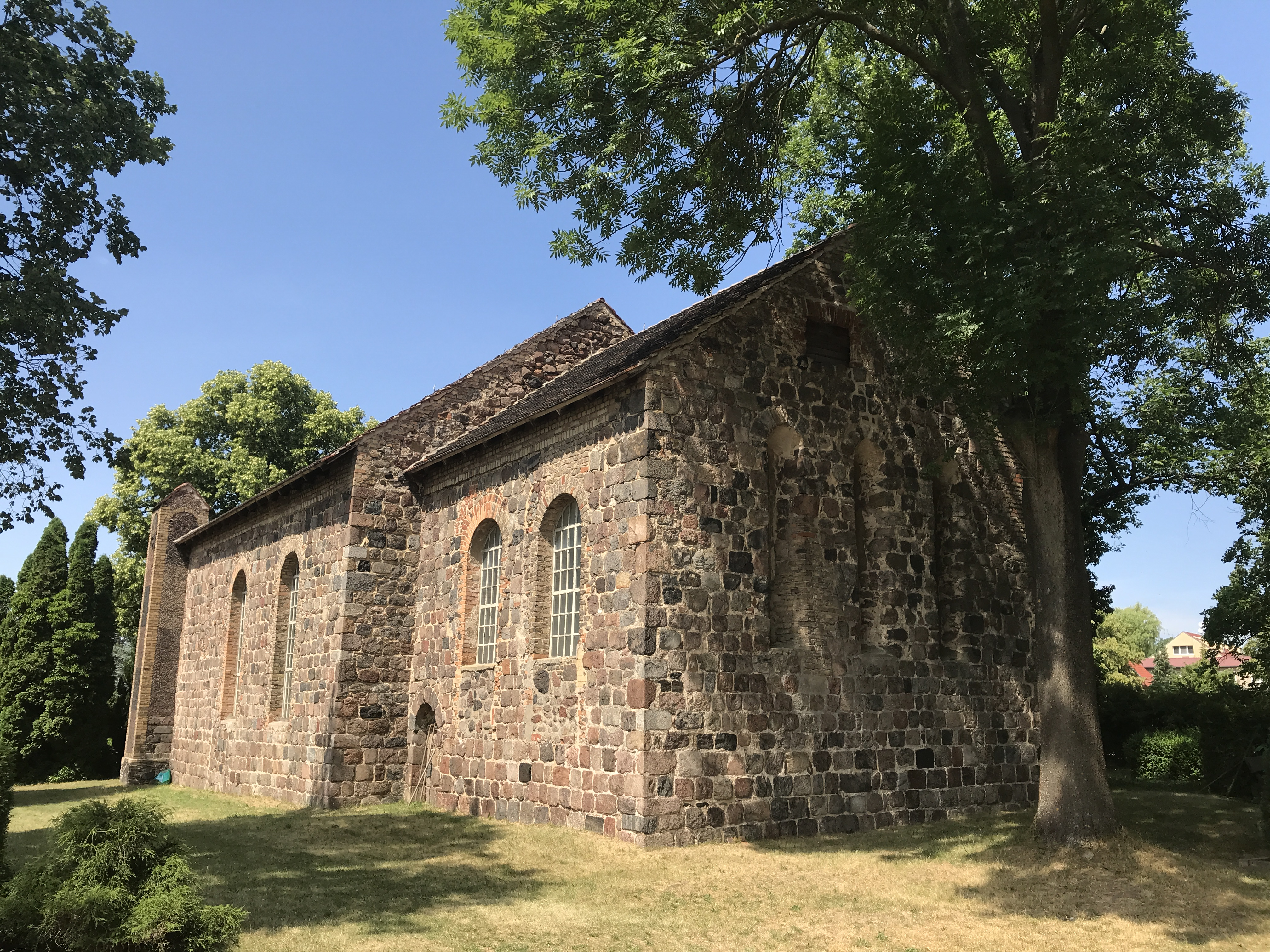 Die Dorfkirche in Hohenstein entstand im 13. Jahrhundert aus Feldsteinen. Im Innern steht unter anderem ein Altarretabel mit einem Kruzifix aus dem 16. Jahrhundert